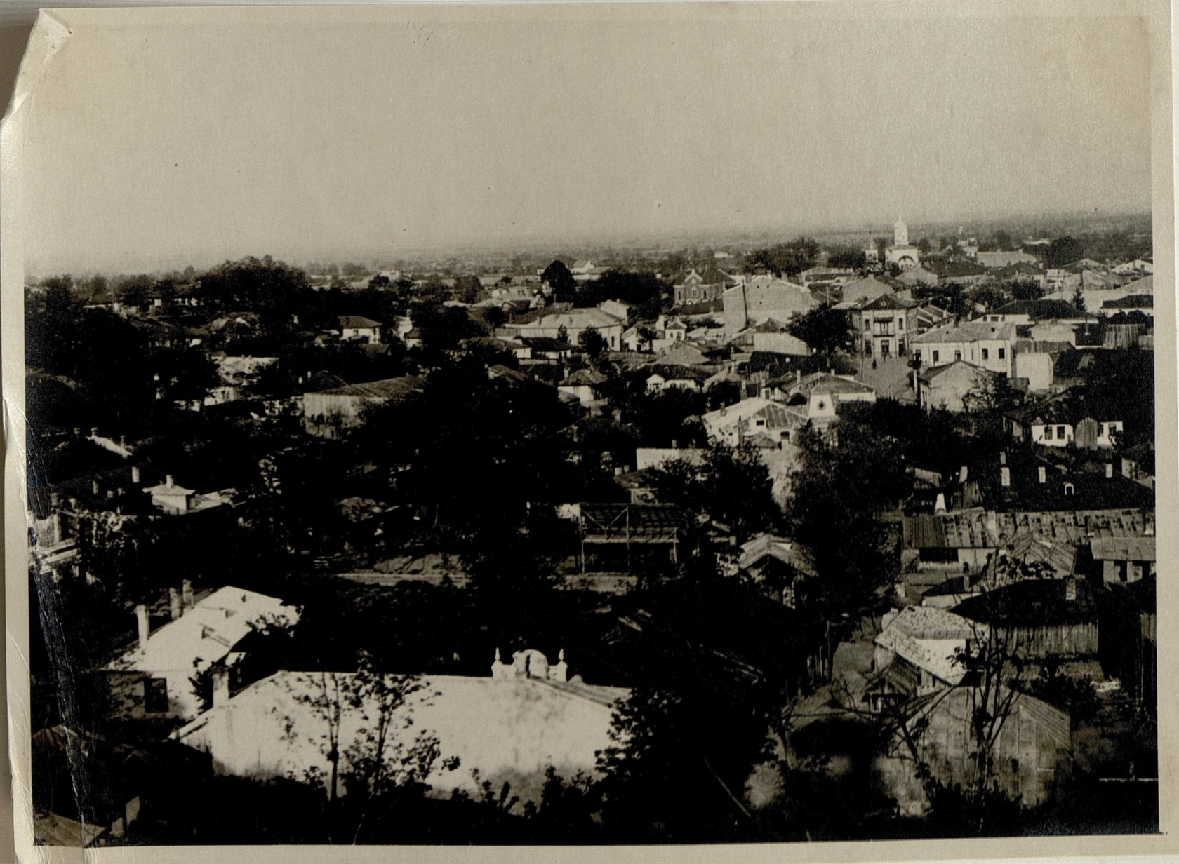 Odobesti Gesamtansicht